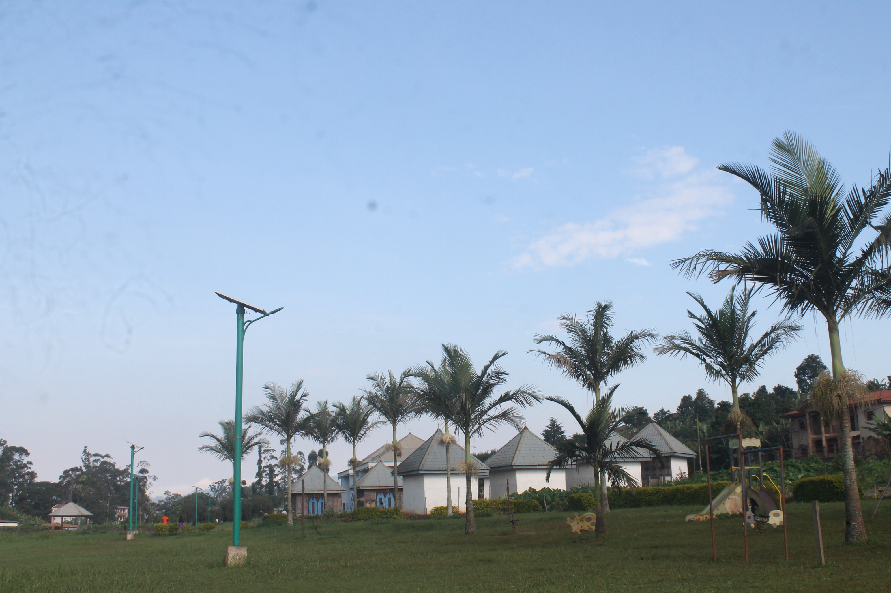 Vue de quelques batiments du musée des civilisations a FOTO